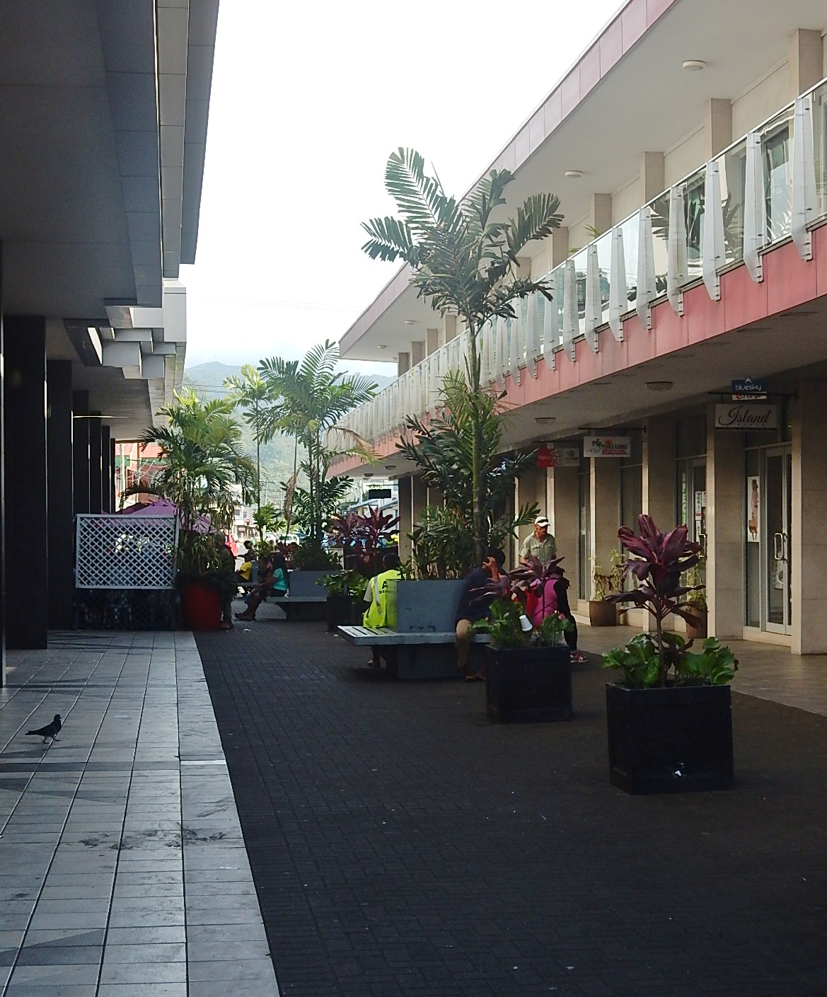 Apia Mall